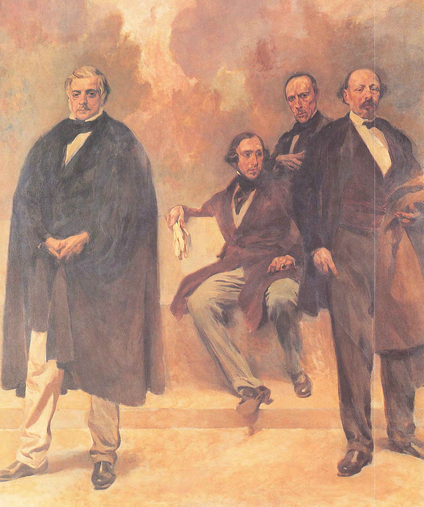 "Passos Manuel, Almeida Garrett, Alexandre Herculano e José Estevão de Magalhães por Columbano Bordalo Pinheiro [pormenor]. Óleo sobre tela concluido em 1926. Passos Perdidos, Assembleia da República. Fotografia de Laura Castro Caldas e Paulo Cintra."